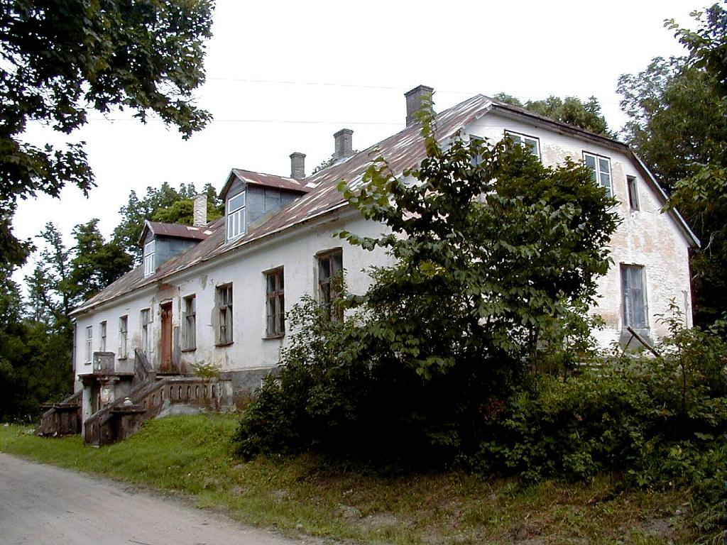 Zelgauskas muiža 2001-08-09